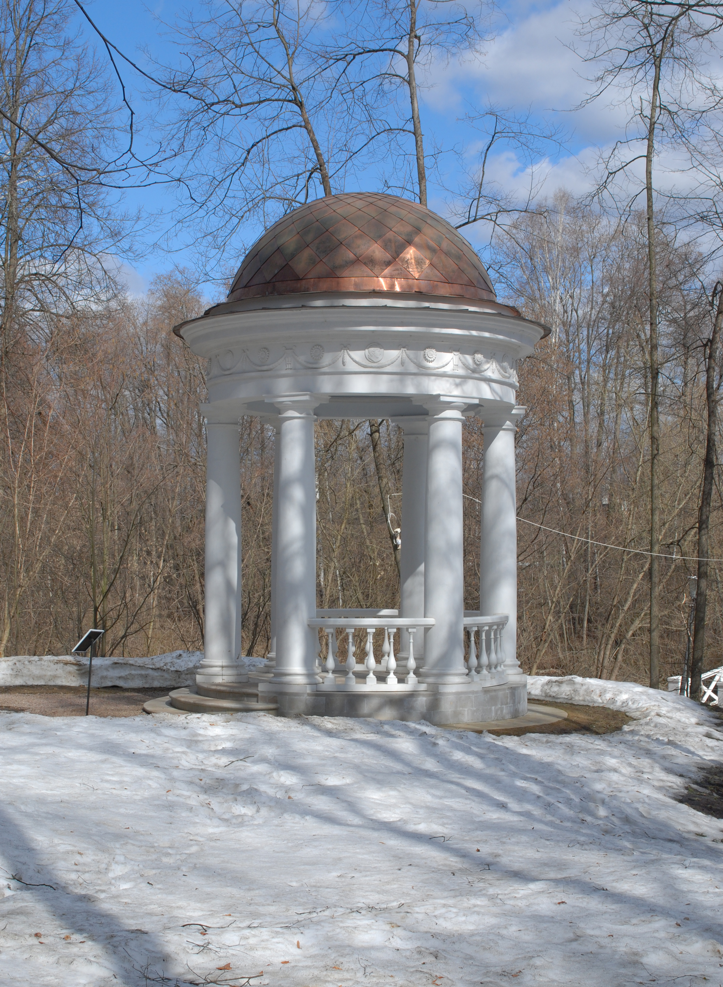 Музей — усадьба «Остафьево» (Вяземских) — «Русский Парнас» (музейный комплекс) (Москва и Московская область, Щербинка, село Остафьево)